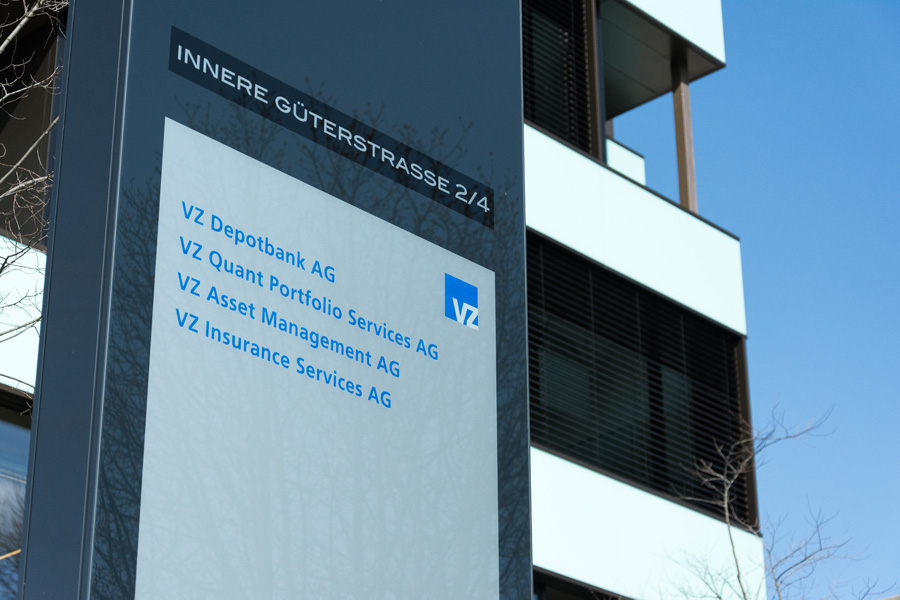 Am Standort der VZ Depotbank in Zug